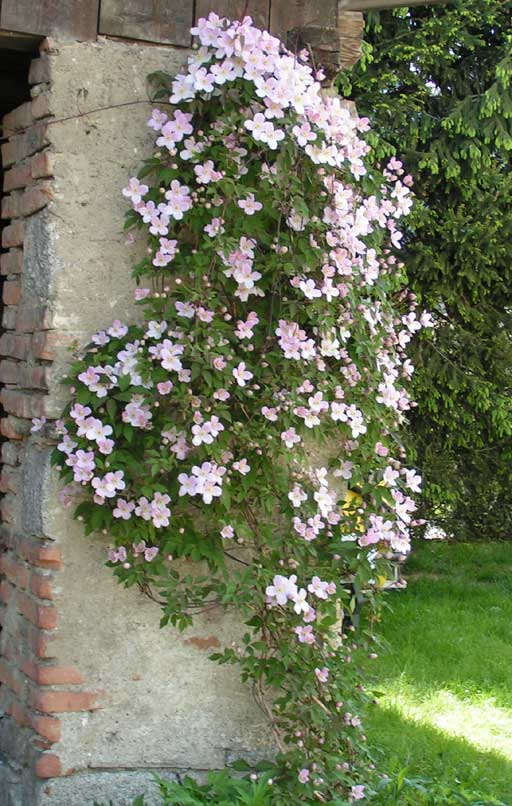 Waldrebe (Clematis) Fotografiert am 15. Mai 2004 in Schabs.